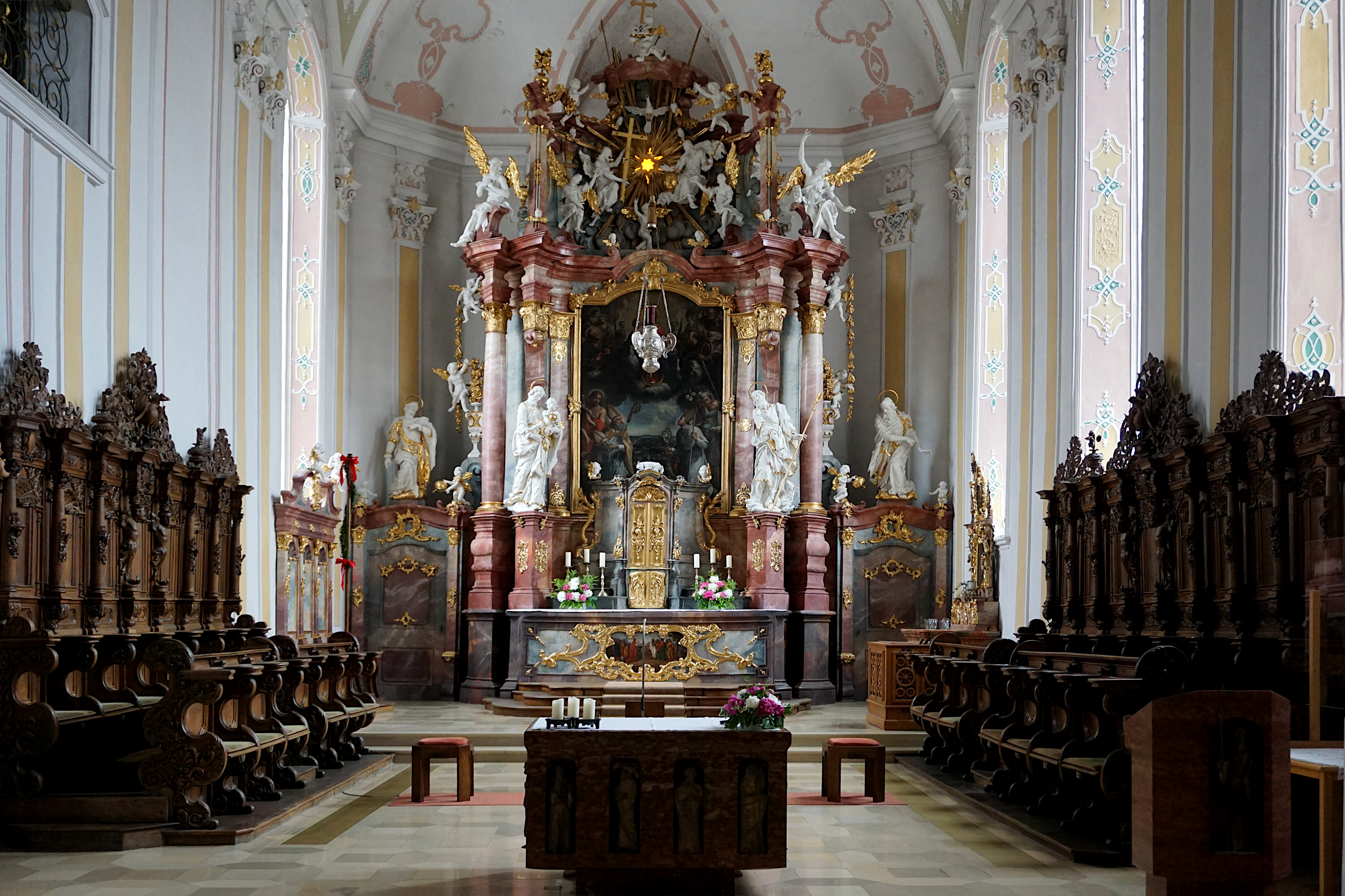 Der Chorraum der Dionysiuskirche in Munderkingen.